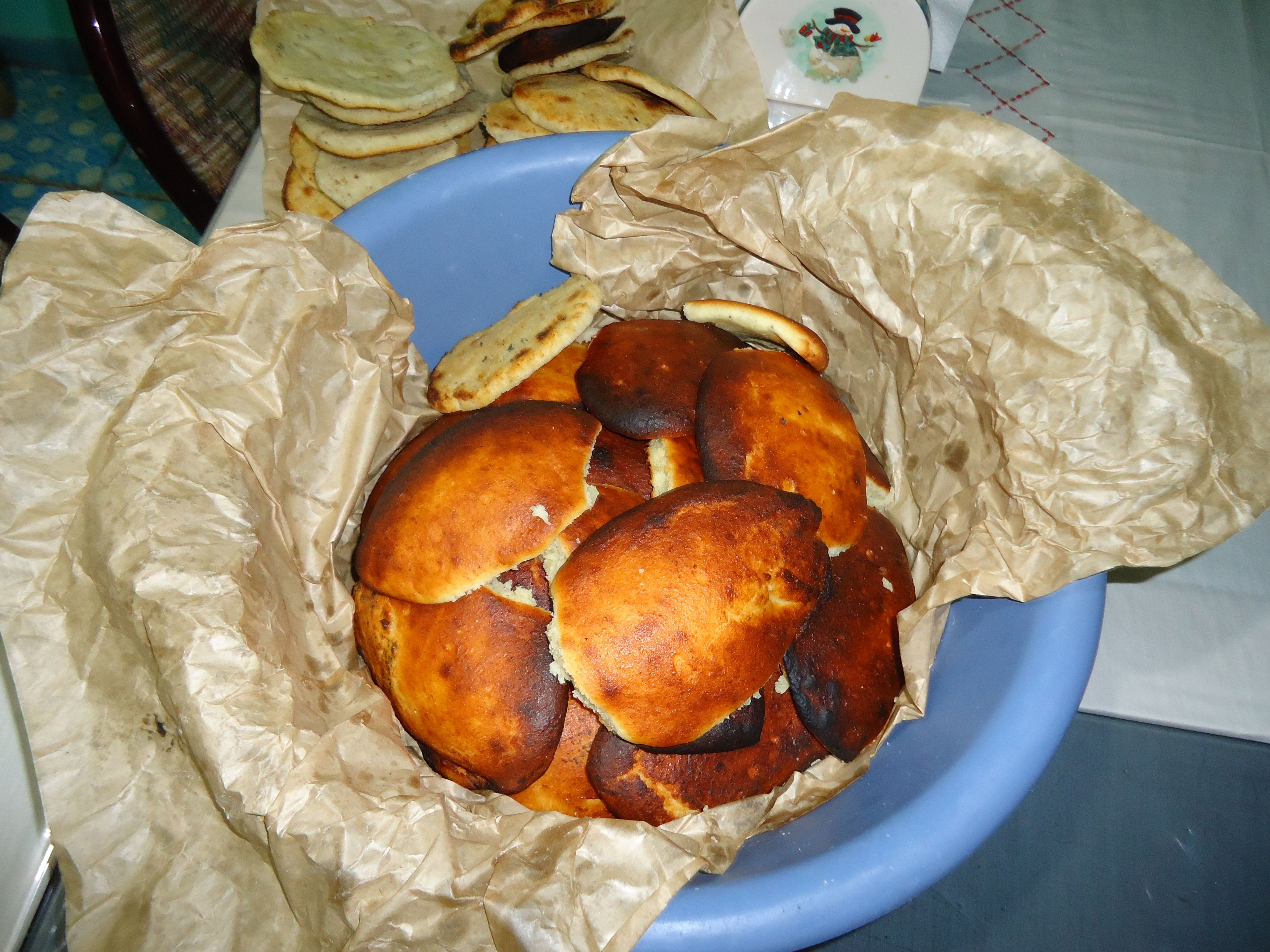 Gorditas de horno típicas elaboradas en Nogalitos de la Cruz, localidad de San Luis Potosí, Mexico